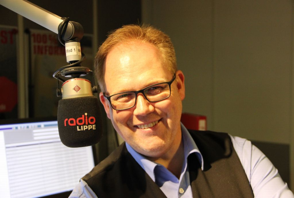 Vom 1. Februar 2015 bis 31. März war Lars Cohrs Chefredakteur des erfolgreichen Lokalsenders Radio Lippe in Detmold.